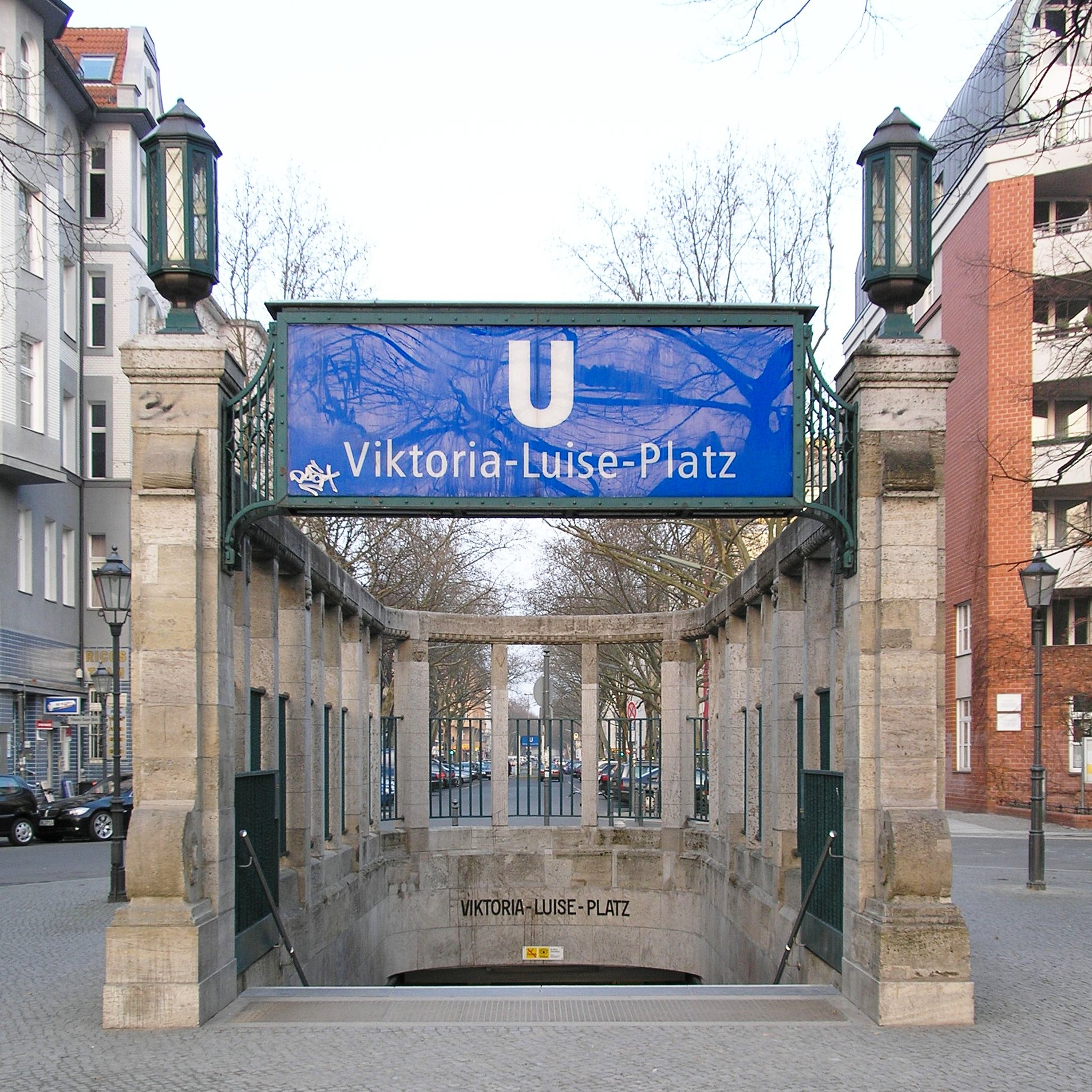 Südwestlicher Zugang zum Berliner U-Bahnhof Viktoria-Luise-Platz in der Form einer Pergola, geradezu die Treppen nach unten auf den Bahnsteig, aufgenommen vom Viktoria-Luise-Platz aus mit Blick durch die Motzstraße in Richtung Nordosten, im Hintergrund der zweite Zugang zum Bahnhof am anderen Ende des Bahnsteigs